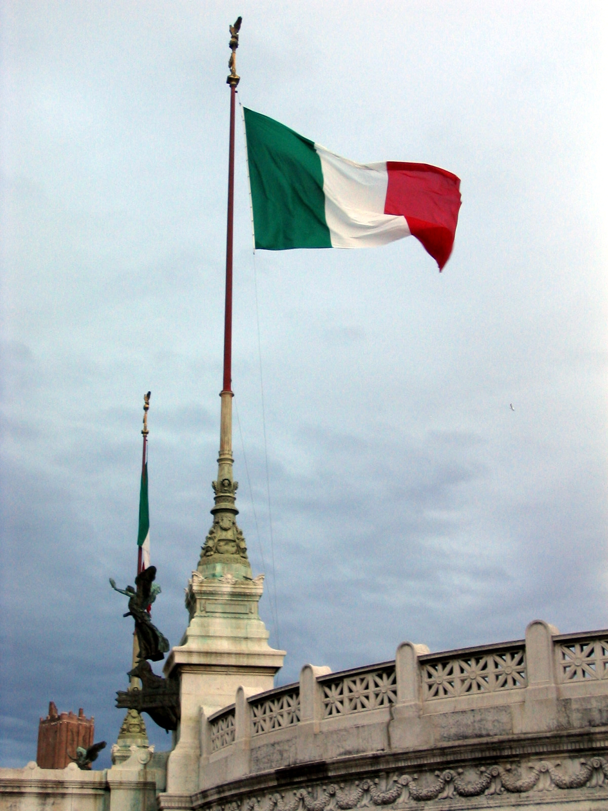 Tricolore del Vittoriano al vento.